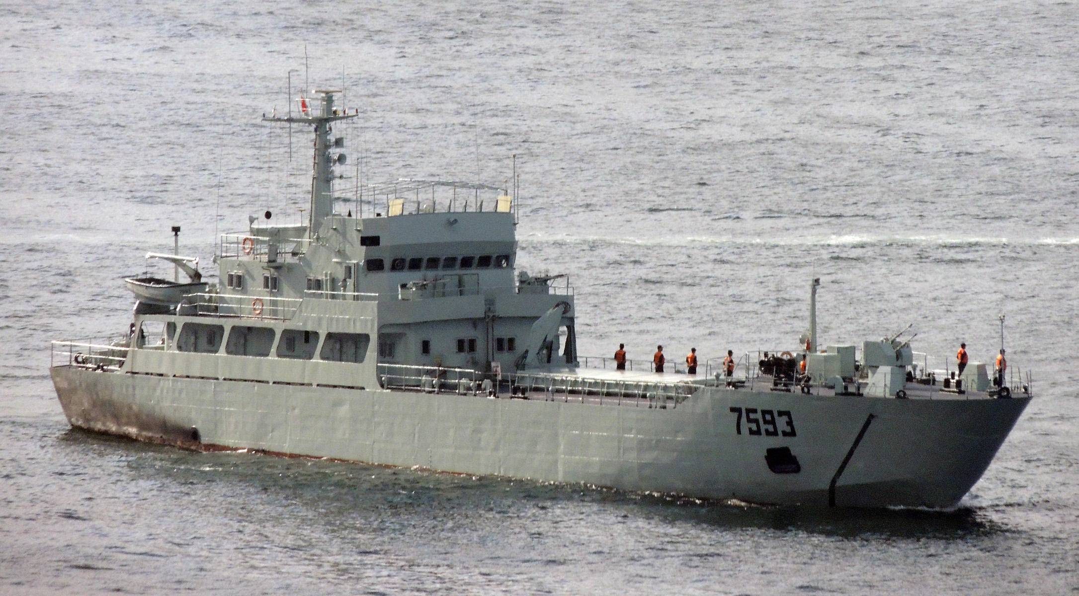 駐港部隊艦艇大隊 - 7593登陸艇